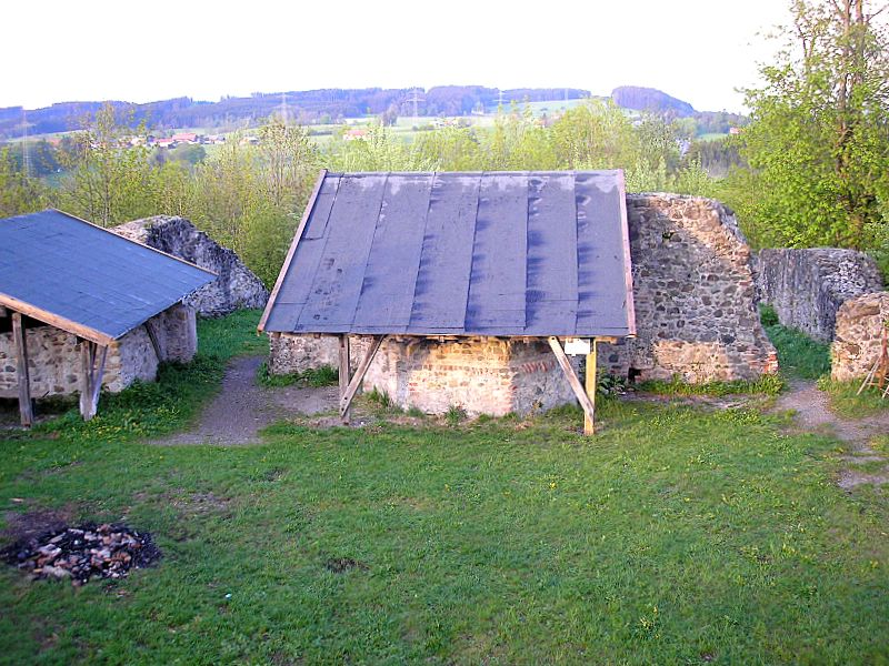 Burg Wolkenberg bei Wildpoldsried (Landkreis Oberallgäu, Bayerisch-Schwaben). Der Burghof vom Bergfried gesehen. Blick nach Nordosten. Eigene Aufnahme, Mai 2008 / Wolkenberg castle near Wildpoldsried (Landkreis Oberallgäu, Bavaria, Germany). The courtyard seen from the keep, looking north east. Own photo, May 2008